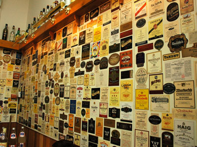 琳瑯滿目的蘇格蘭威士忌標籤 蘇格蘭威士忌種類繁多，品牌更是不勝枚舉，在蘇格蘭威士忌遺產中心的迎賓室裡，牆上全貼滿了各種不同種類、不同品牌的酒標，各位能認出其中幾張？ 本圖片由上傳者User:SElephant拍攝於2004年8月。